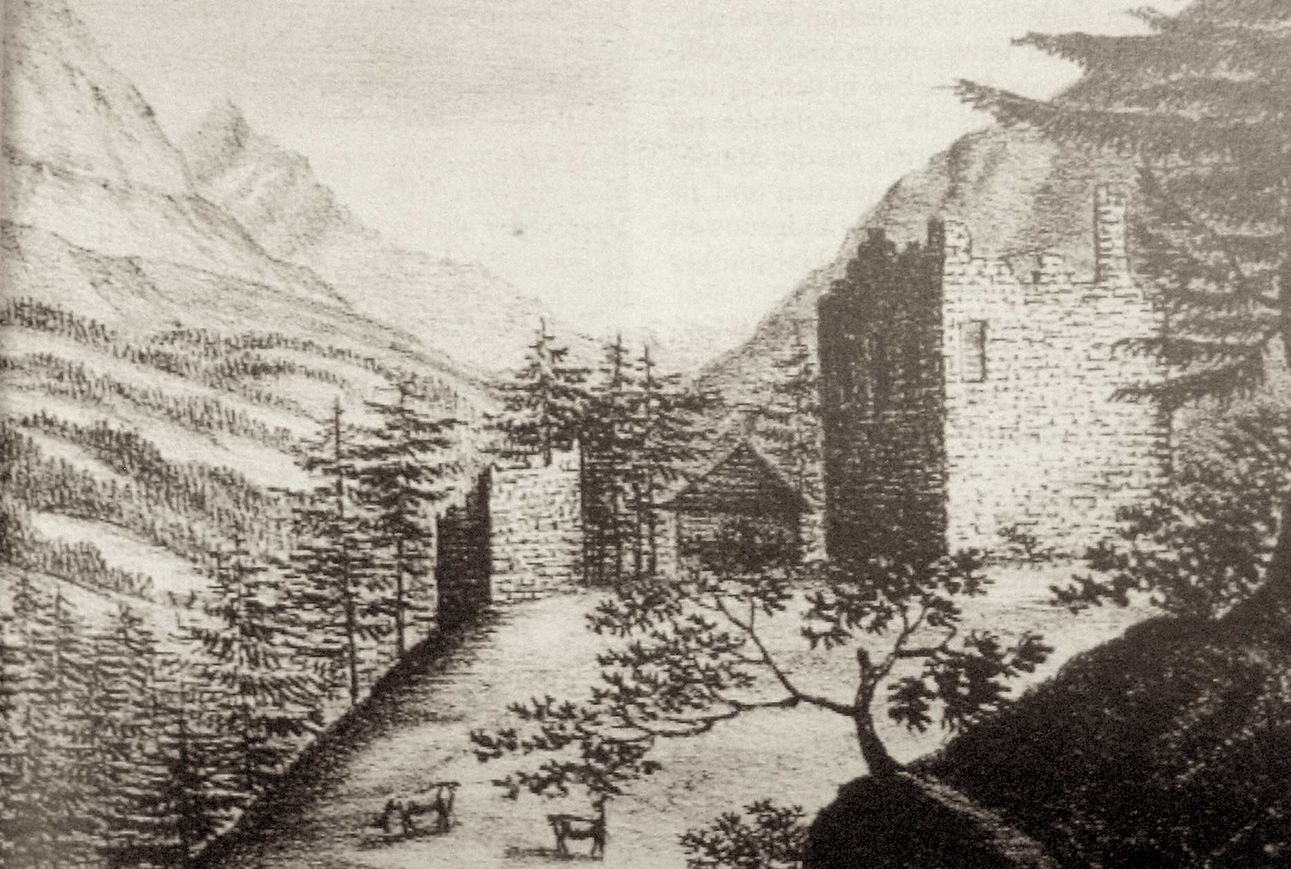 Ruine Splügen, nach einer Zeichnung von H. Kranek, ca. 1830